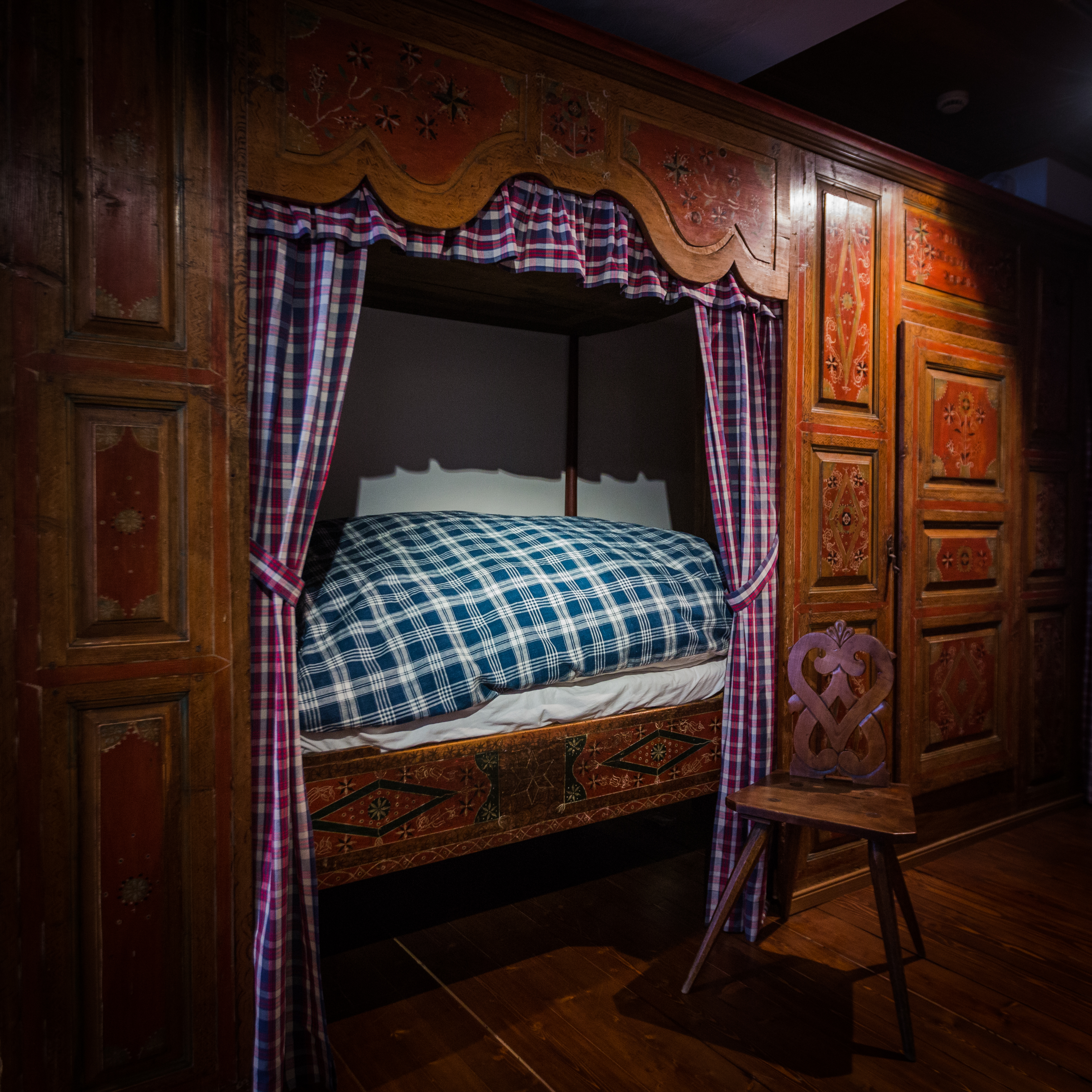 Musée alsacien de Strasbourg : lit et boiserie d'alcôve polychrome (Alteckendorf, 1844)